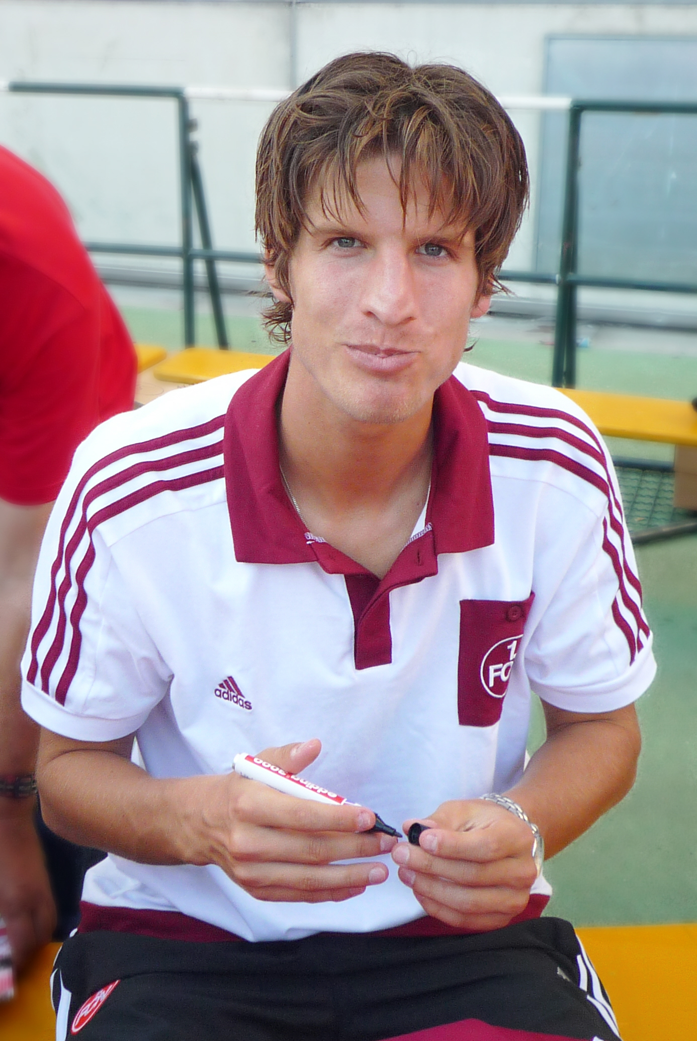 Timm Klose